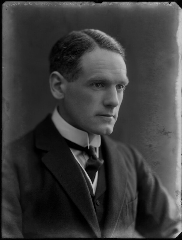 Lord Hacking